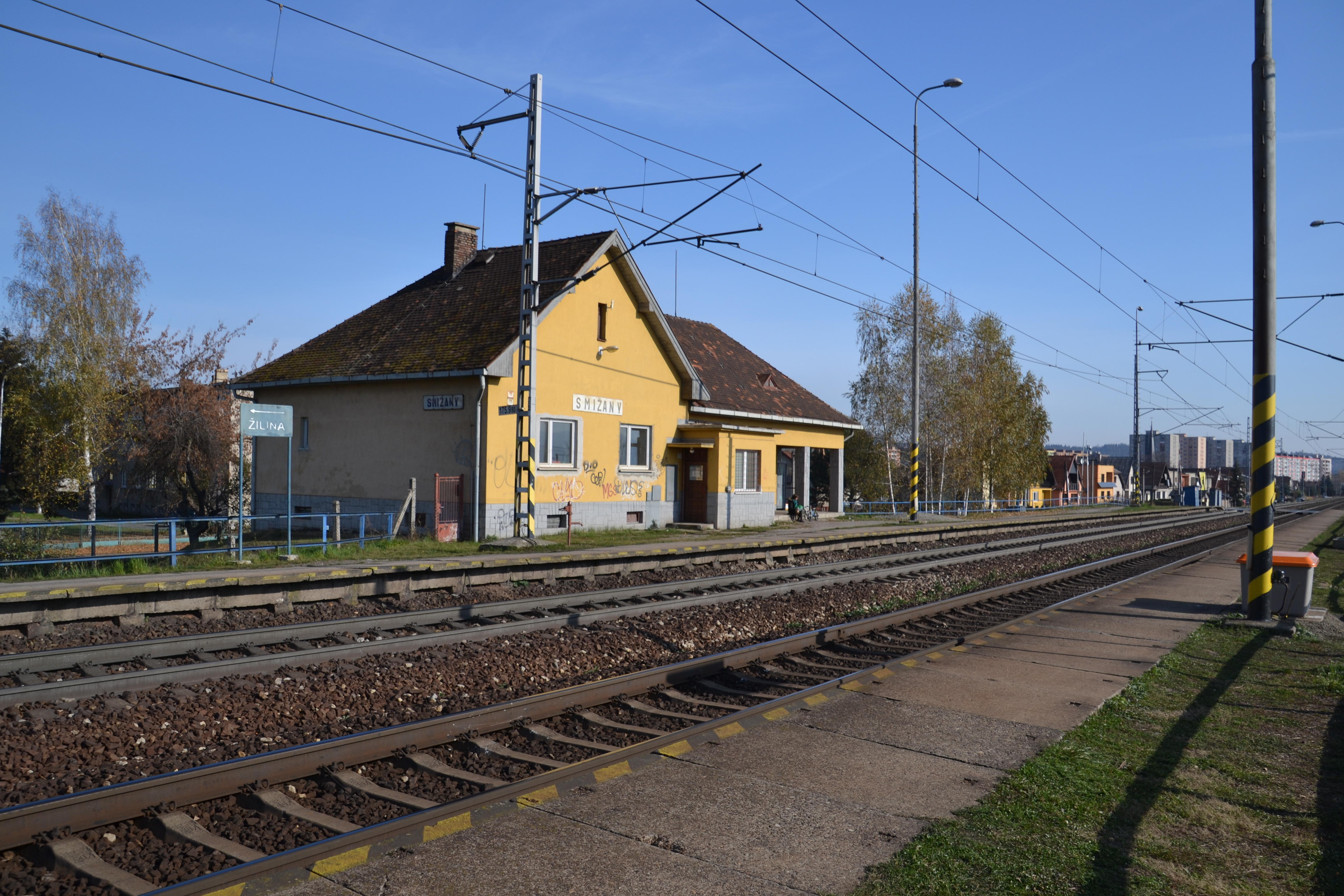 Železničná stanica